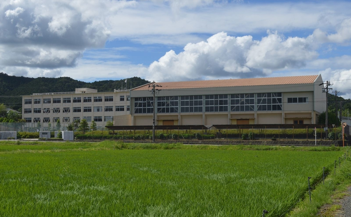 愛知県新城市にある愛知県立新城東高等学校作手分校（愛知県立新城東高校作手分校）。